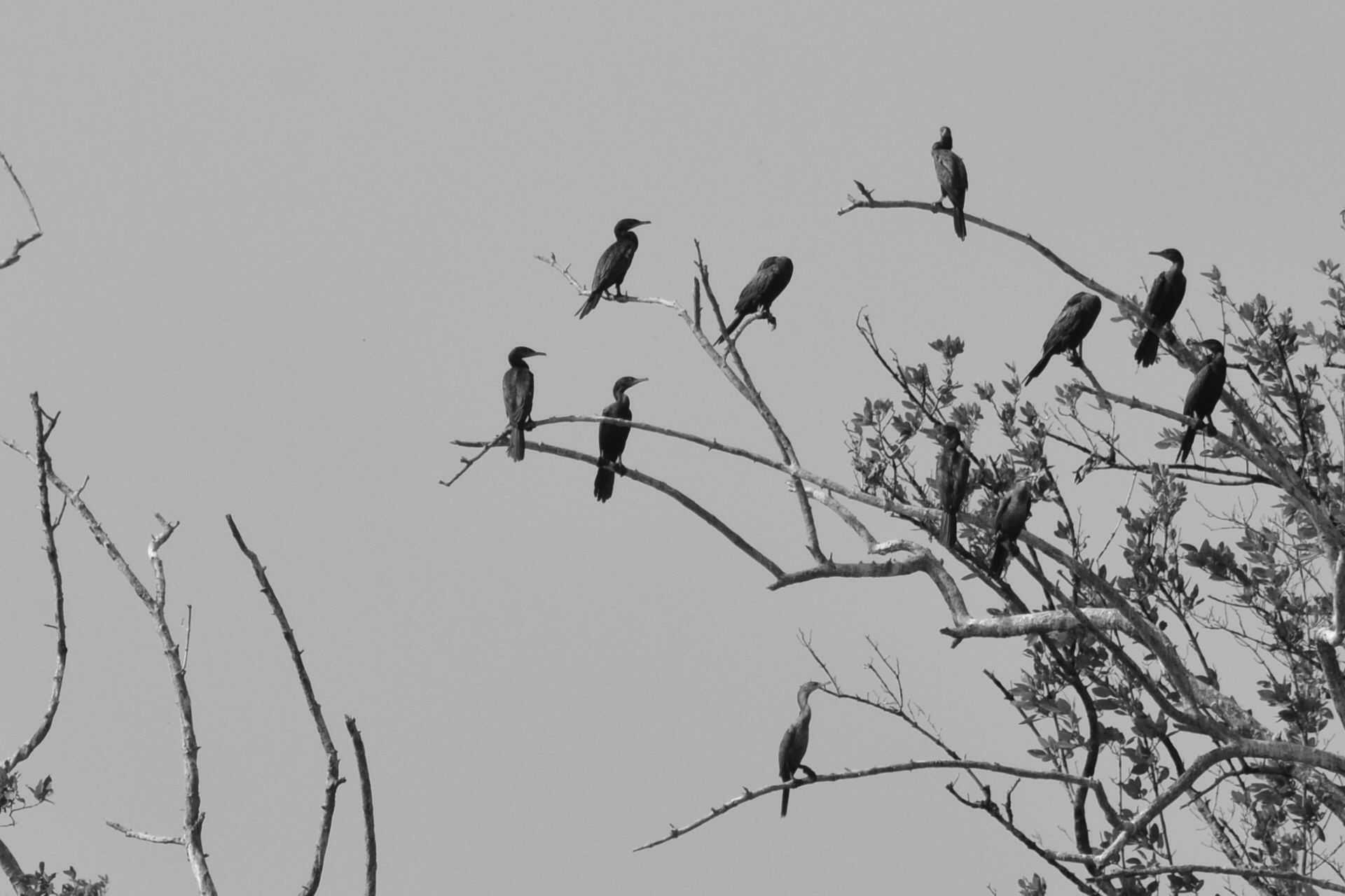 Vista de pássaros do Rio Bacanga MA